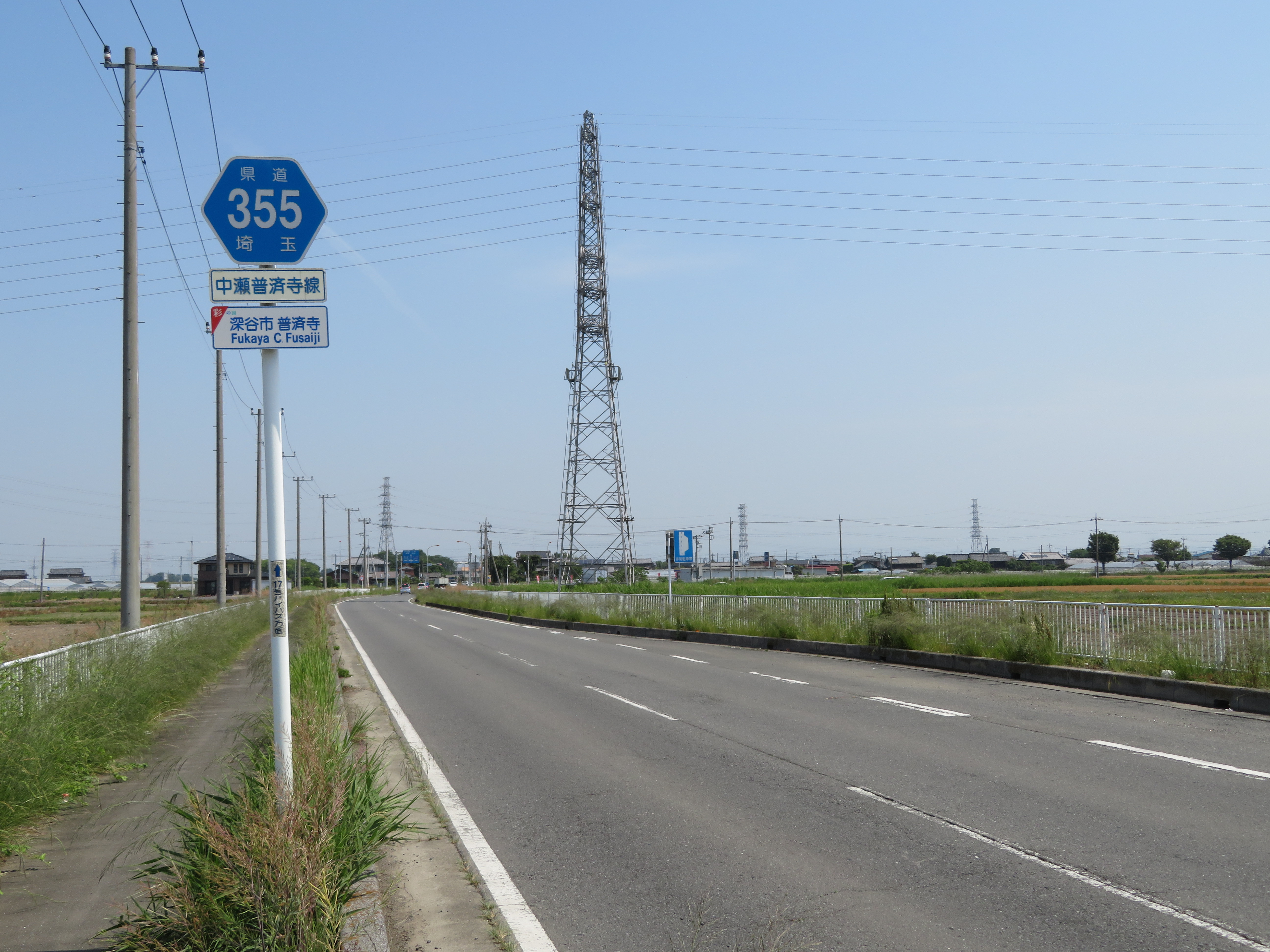 埼玉県道355号線深谷市普済寺付近（深谷バイパス方面を撮影） Canon PowerShot SX720 HS